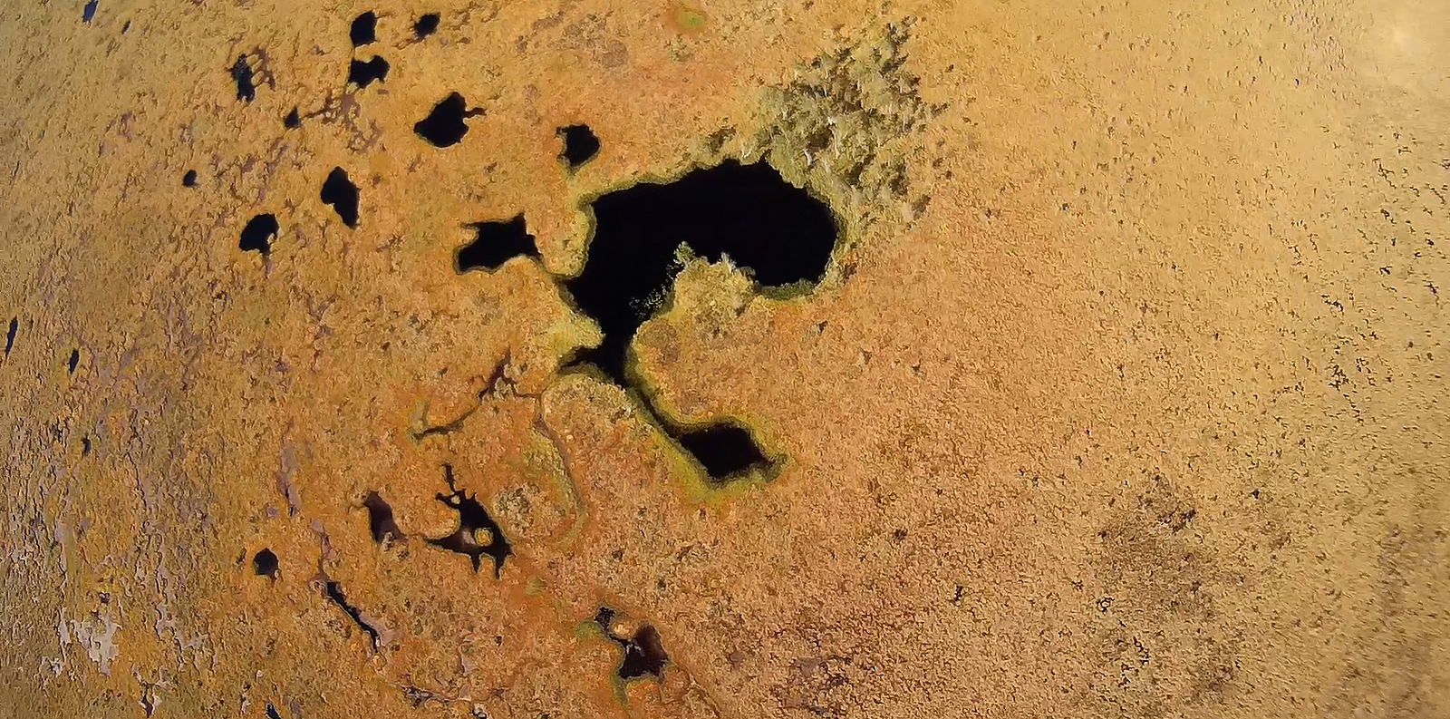 Aukštasis Tyras